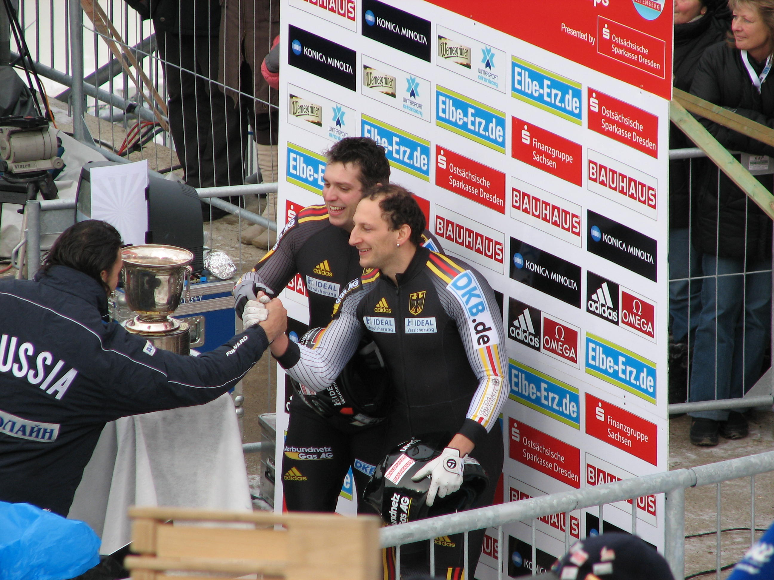 Bob-Weltmeisterschaft in Altenberg 2008, 11. - 24. Februar 2008